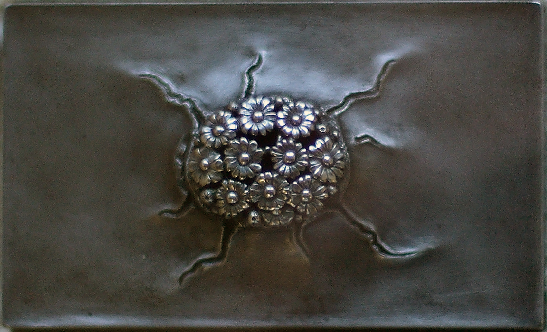 Plakette „Evangelium“. Eine Gruppe Blumen durchbricht ein Stück Waffenstahl